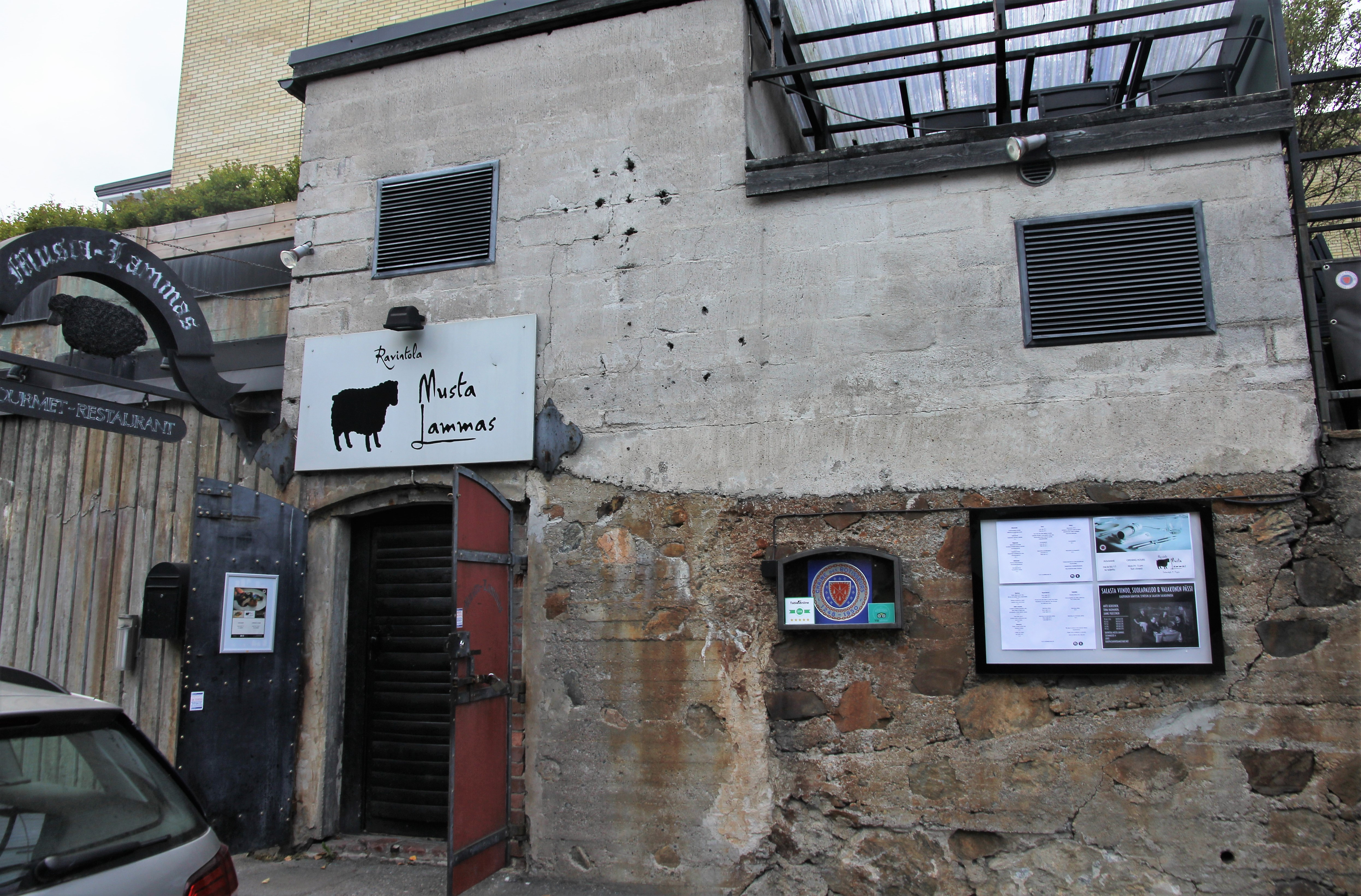 Ravintola Musta Lammas Kuopion Väinölänniemen kaupunginosassa osoitteessa Satamakatu 4, Kuopio. Gourmetravintolan vastapäätä sijaitsee hotelli Scandic Kuopio.